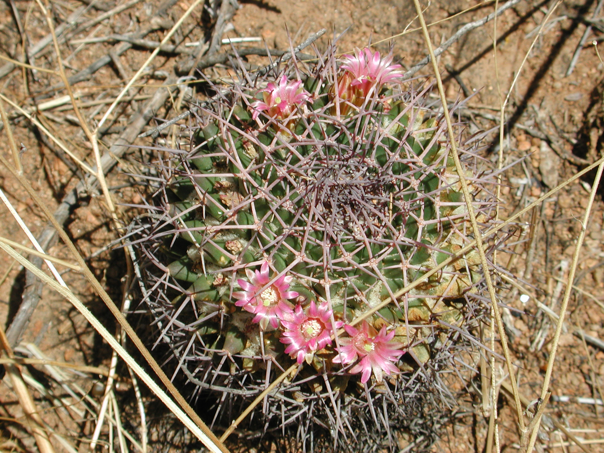 Mammillaria carnea in blossom. Tehuacán-Cuicatlán Valley, Oaxaca, México